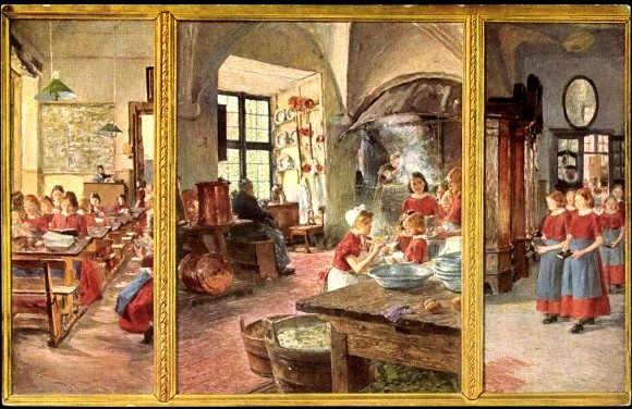 Im Lübecker Waisenhaus. Dresden, Galerie Neue Meister, Inventarnummer Gal.-Nr. 2323, Öl auf Leinwand, Mitteltafel: 130 x 100 cm, Seitenflügel: 130 x 50 cm